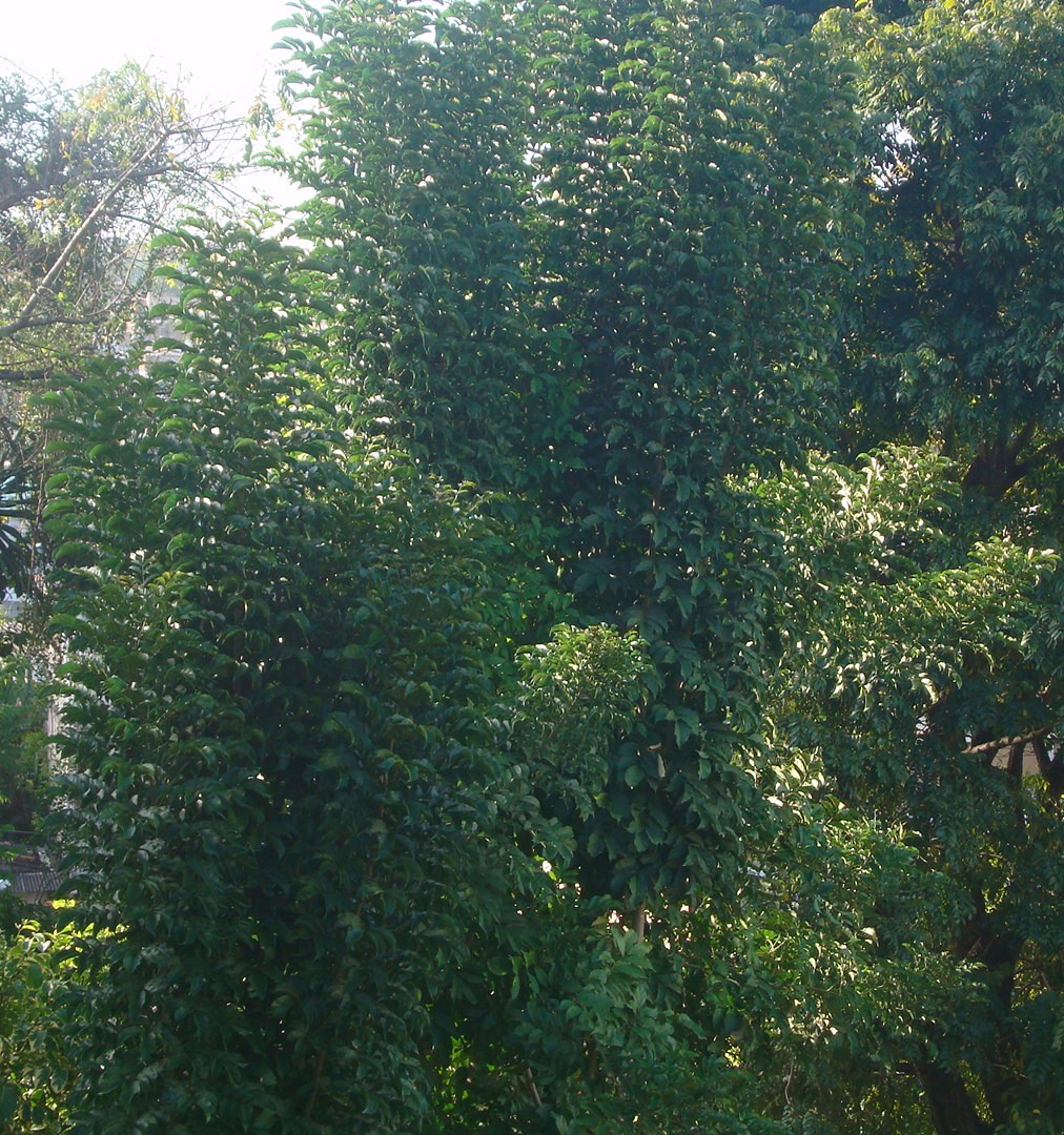 Conhecida no Brasil como Akoko, Folha de Akoko.Newbouldia laevis Seem., Bignoniaceae